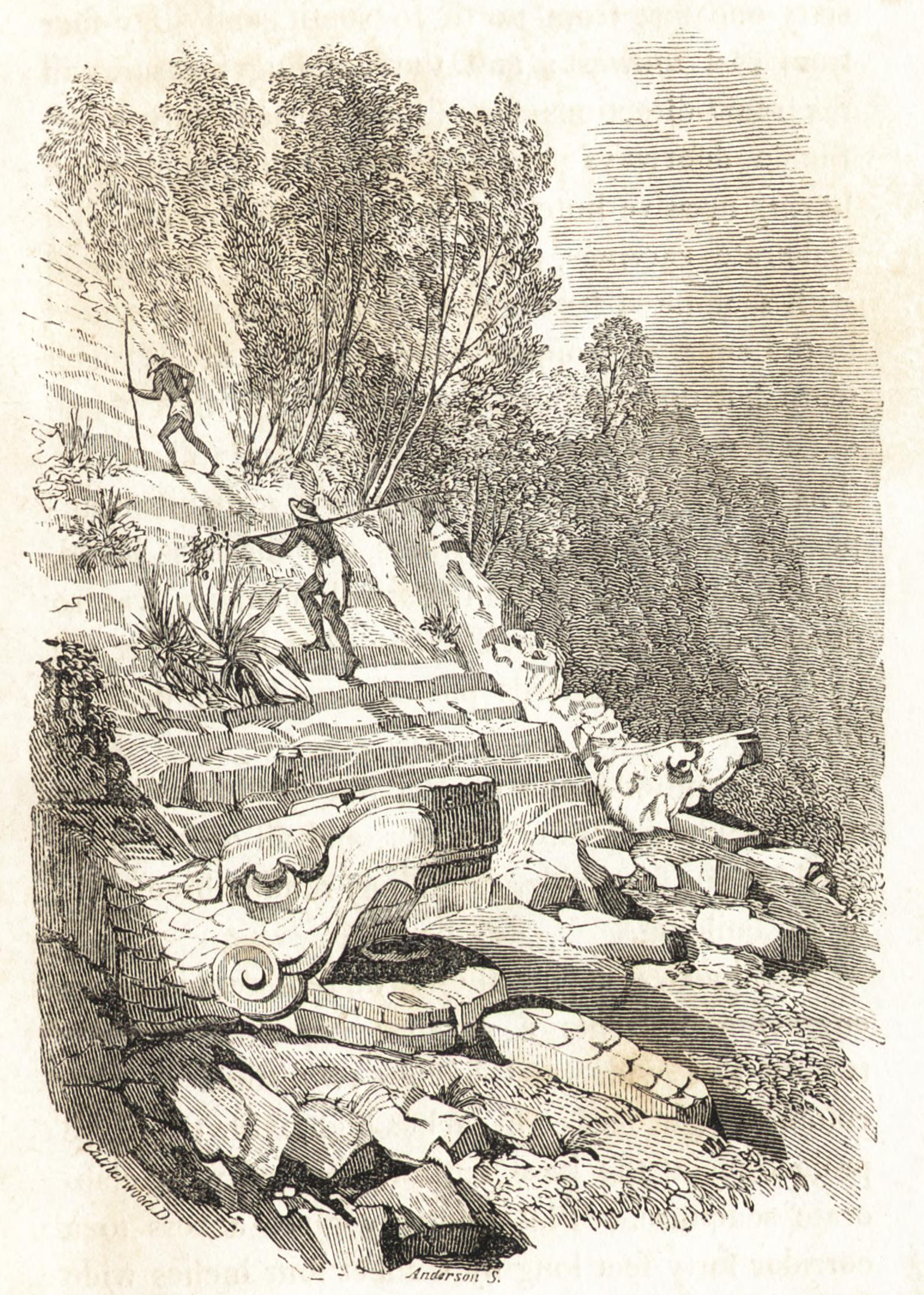 Debuxo da cabeza das serpes da escalinata do templo de Kukulkán en Iucatán, México. Debuxo de Frederick Catherwood no libro Incidents of travel in Yucatan de 1843 de John Lloyd Stephens.